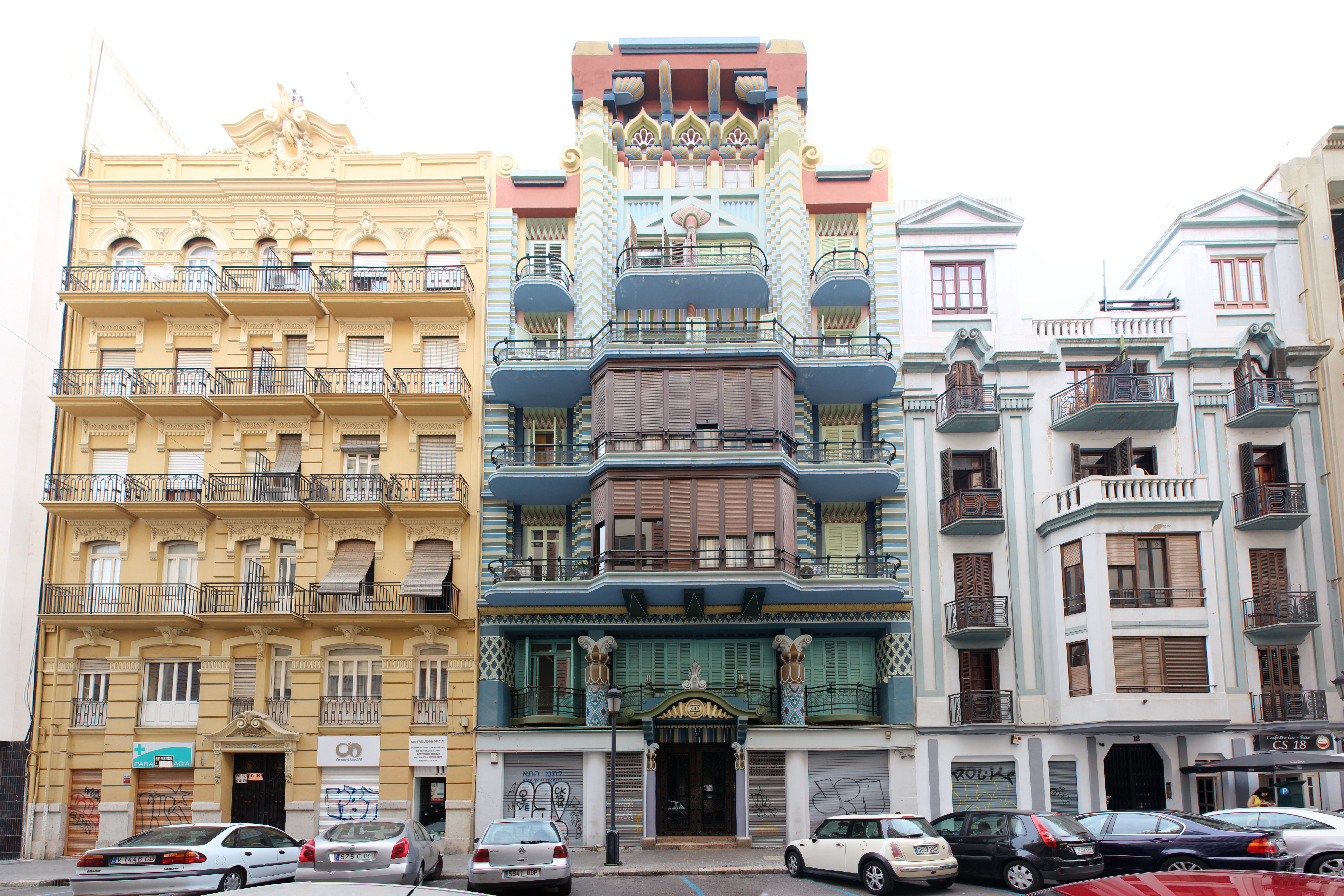 Casa Judía de Joan Francesc Guardiola i Martínez en la calle Castellón 20, 1930